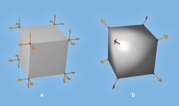 vertex normal กับการเปลี่ยนแปลงการสะท้อนของพื้นผิว